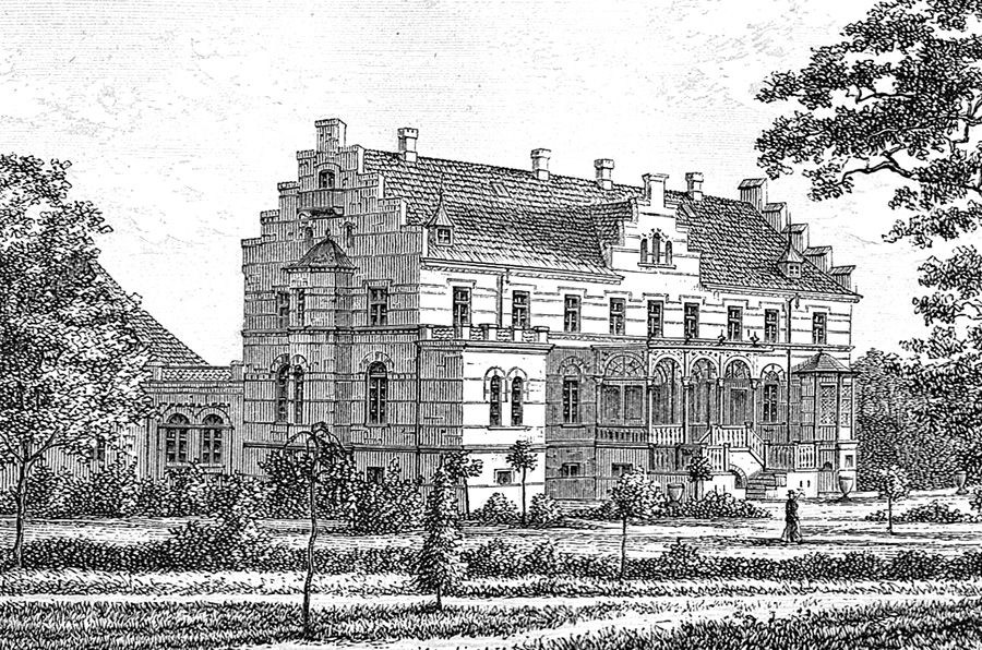 Lungholm er en gammel hovedgård, som blev kaldt Olstrupgaard og nævnes første gang i 1450. Kaldt Lungholm fra 1639. Gården ligger i Olstrup Sogn, Fuglse Herred, Maribo Amt, Holeby Kommune. Hovedbygningen er opført i 1853-1856 .